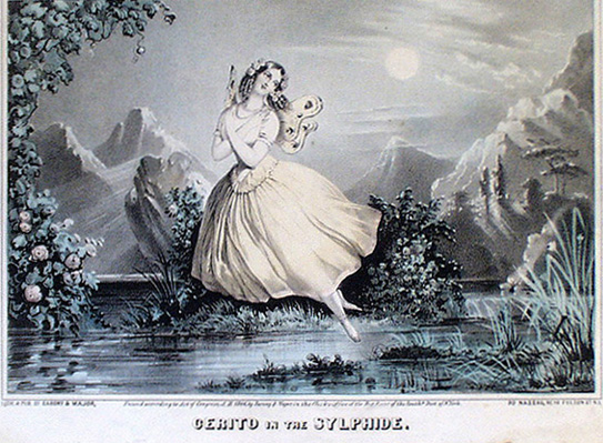 Francesca Cerrito, italian dancer, In La Sylphide